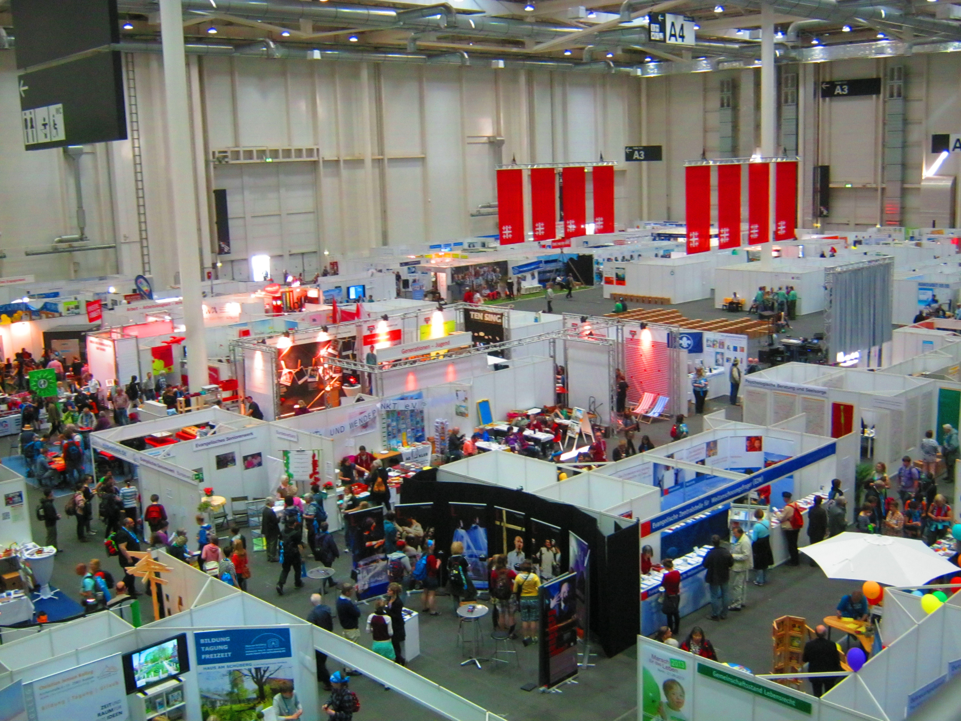 Markt der Möglichkeiten auf dem Deutschen Evangelischen Kirchentag 2013.